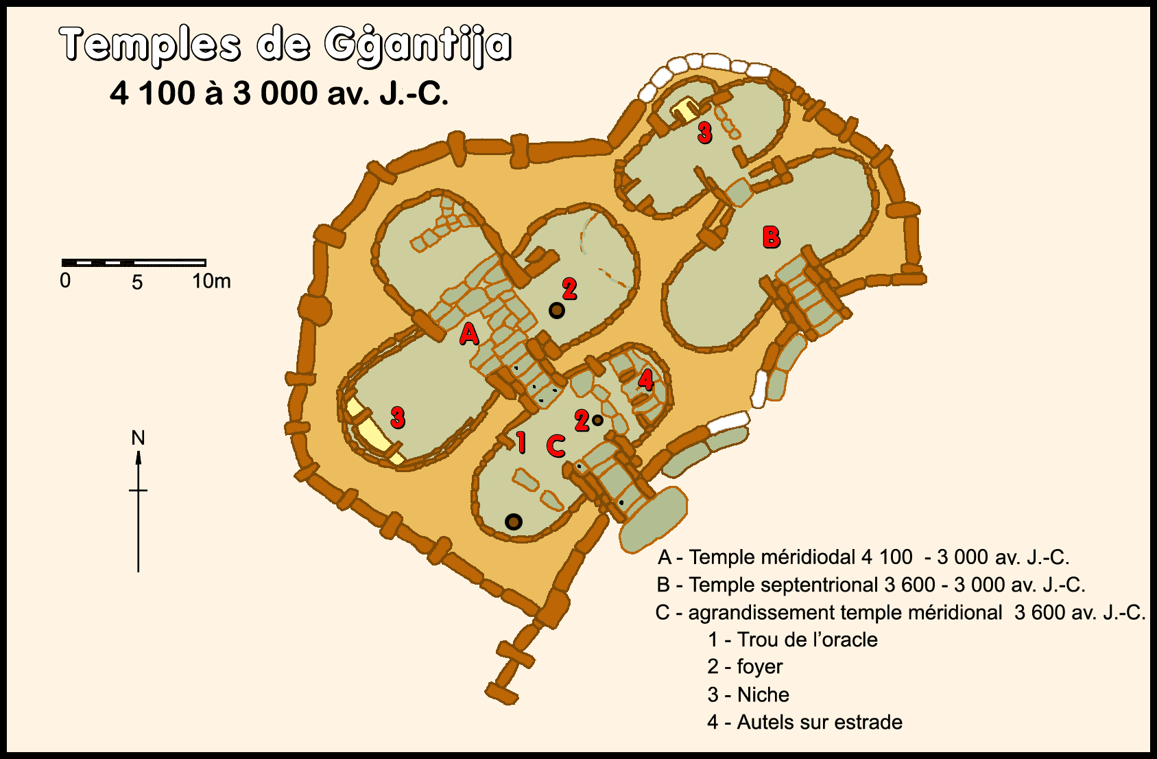 plan du site des temples de Ggantija